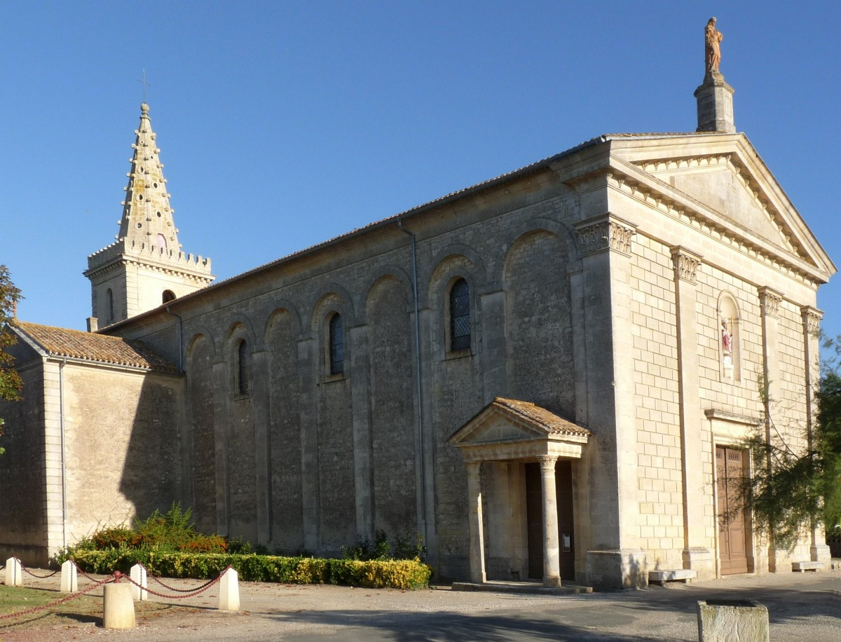 Vue latérale de l'église du Centre, Jau-Dignac-et-Loirac, Gironde, France